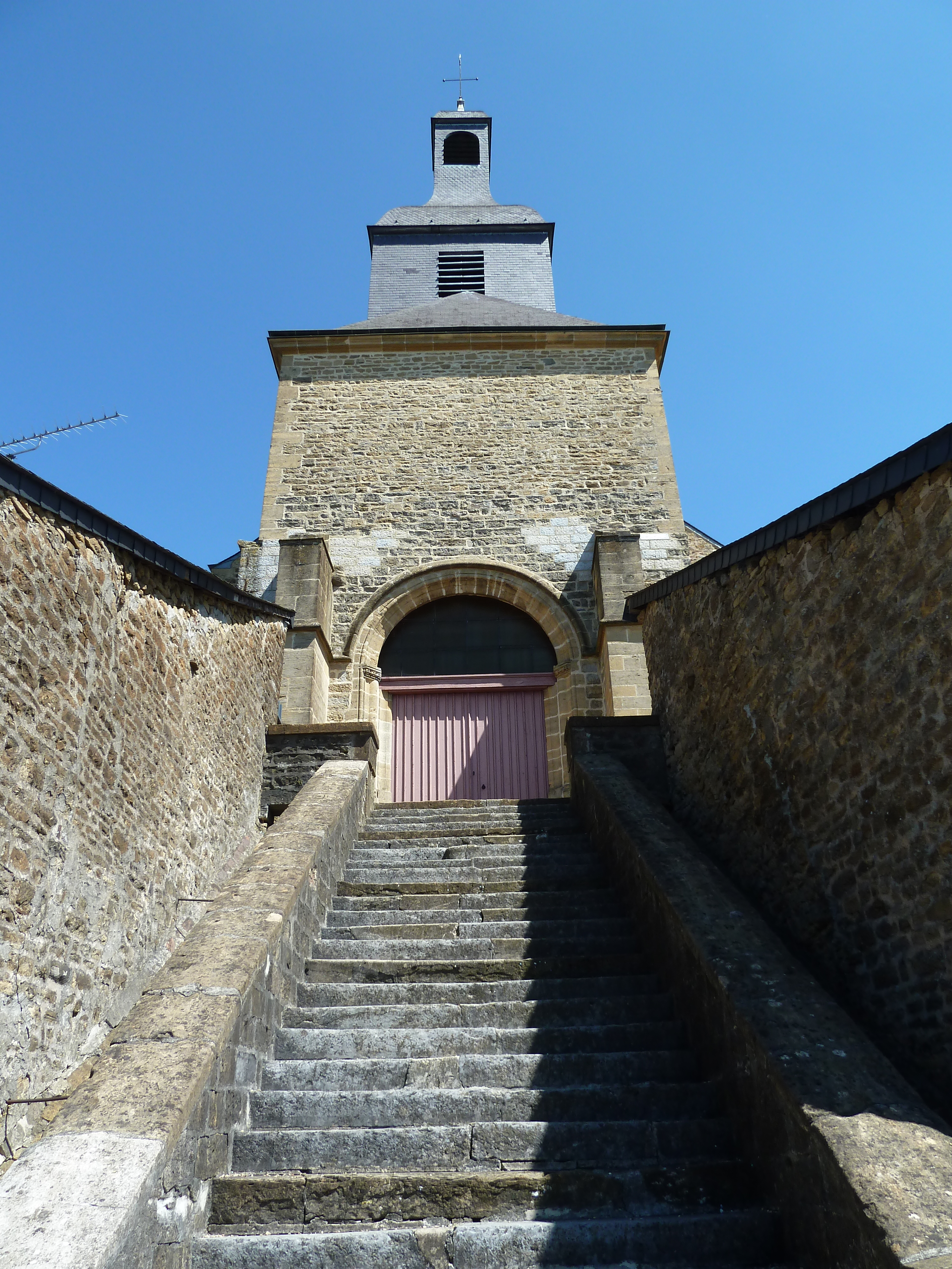 L'église est située sur la commune de Renwez, dans le département français des Ardennes